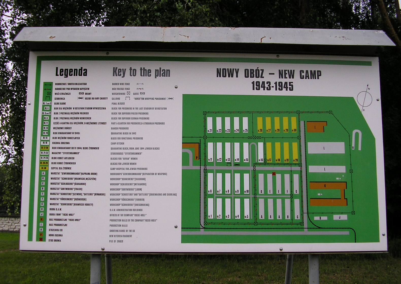 Plan des "Neuen Lagers" KL Stutthof mit Legende